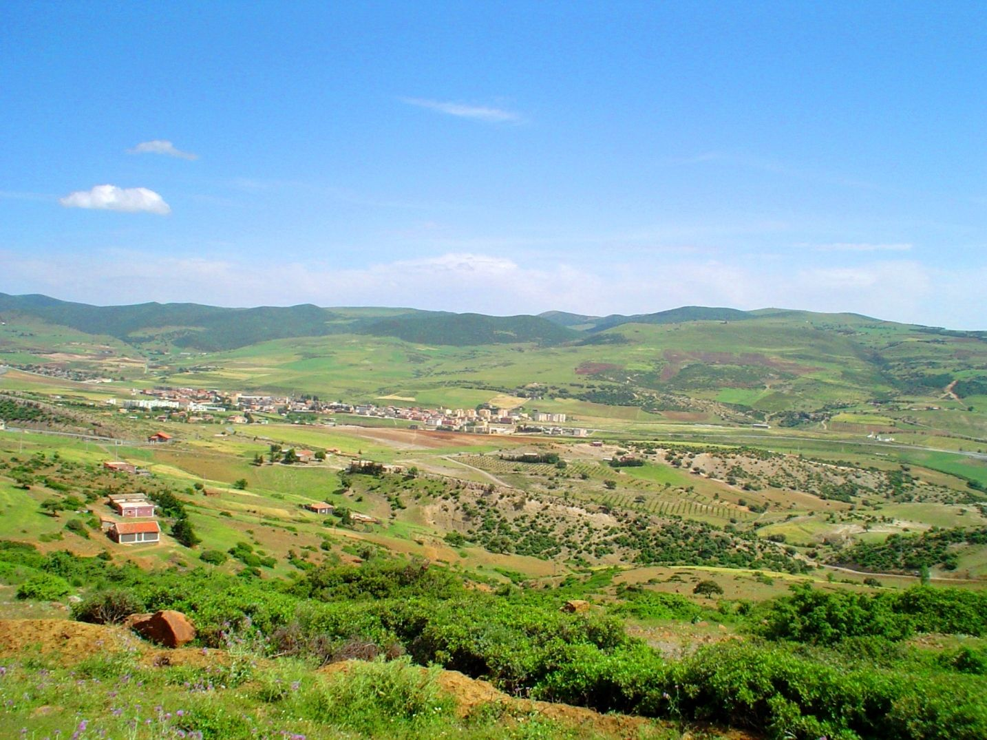 Djouab جواب